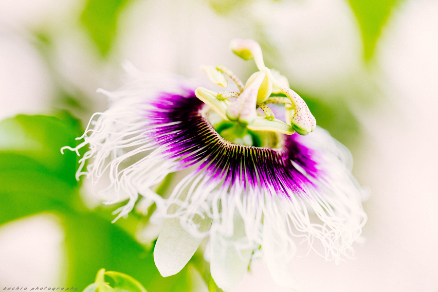 Цветок маракуйи